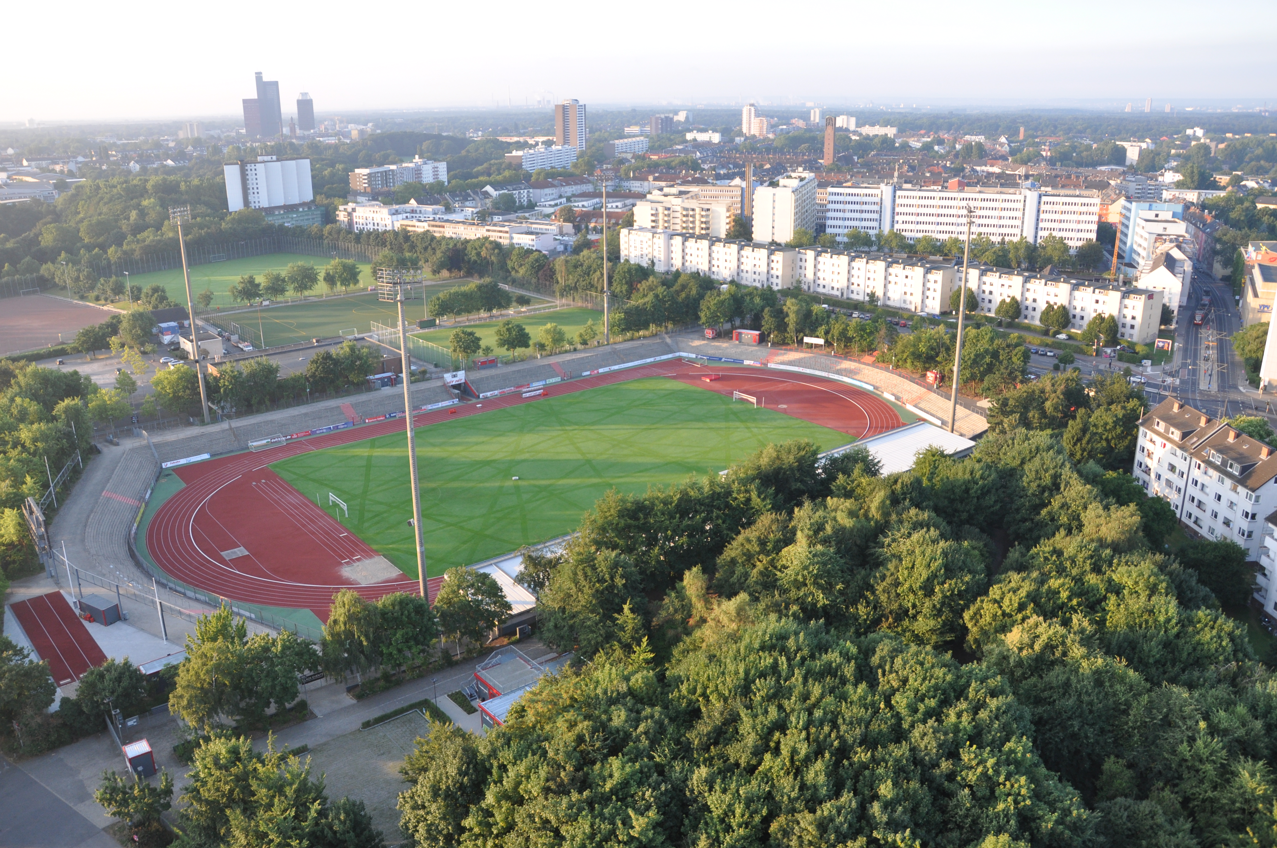 Ballonfahrt Köln. Blick aus nördlicher Richtung über Köln-Zollstock. Im Vordergrund das Südstadion und das Trainingsgelände des SC Fortuna Köln.